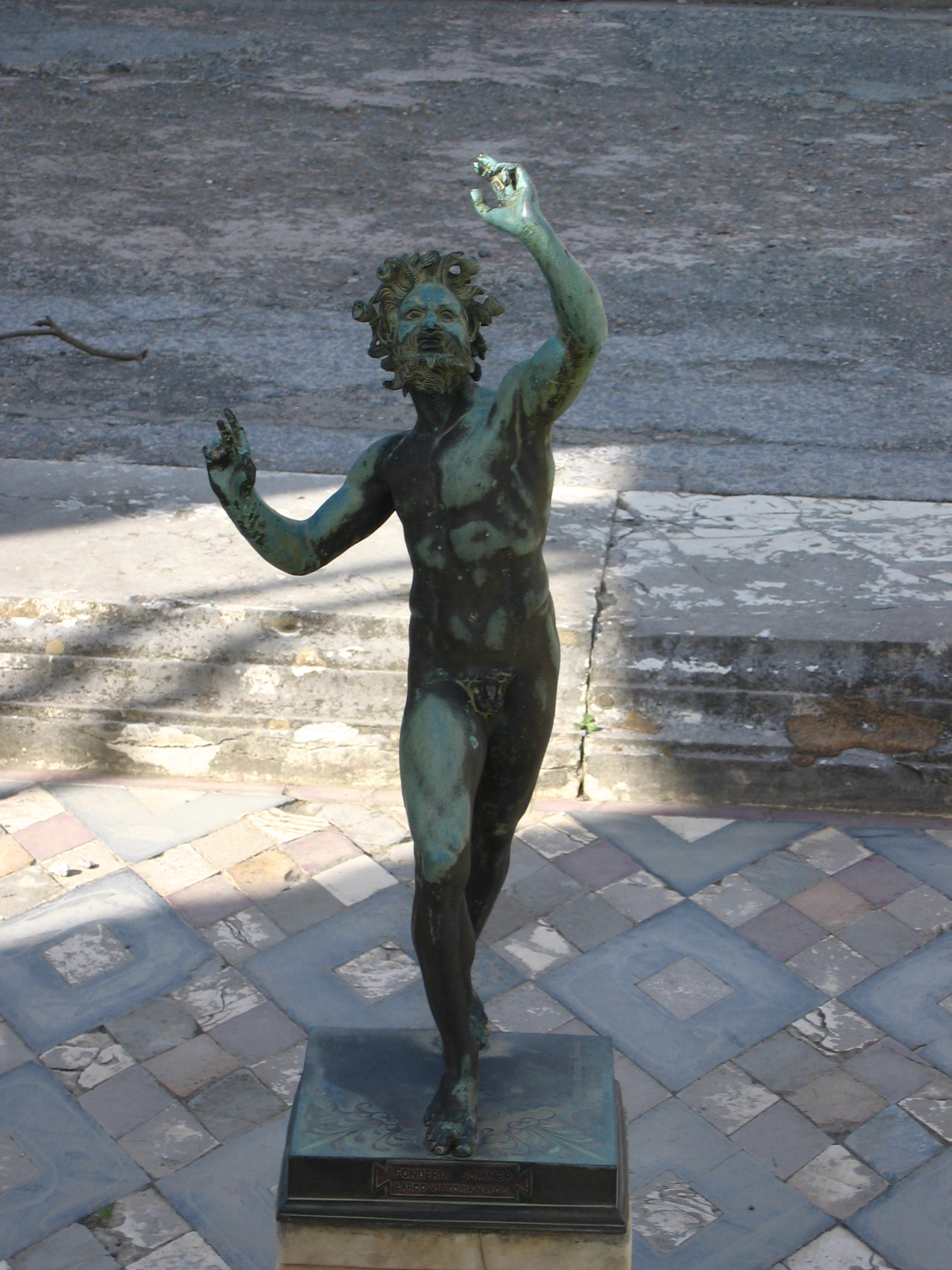 statue du faune, maison du faune, Pompéi